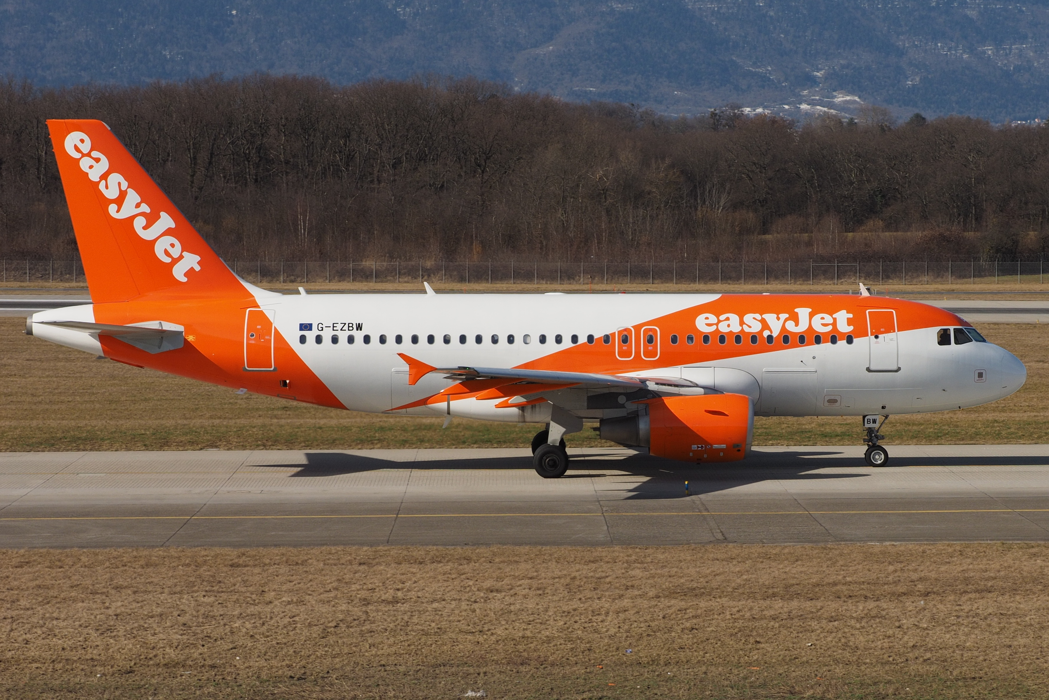 GVA 20.02.2015